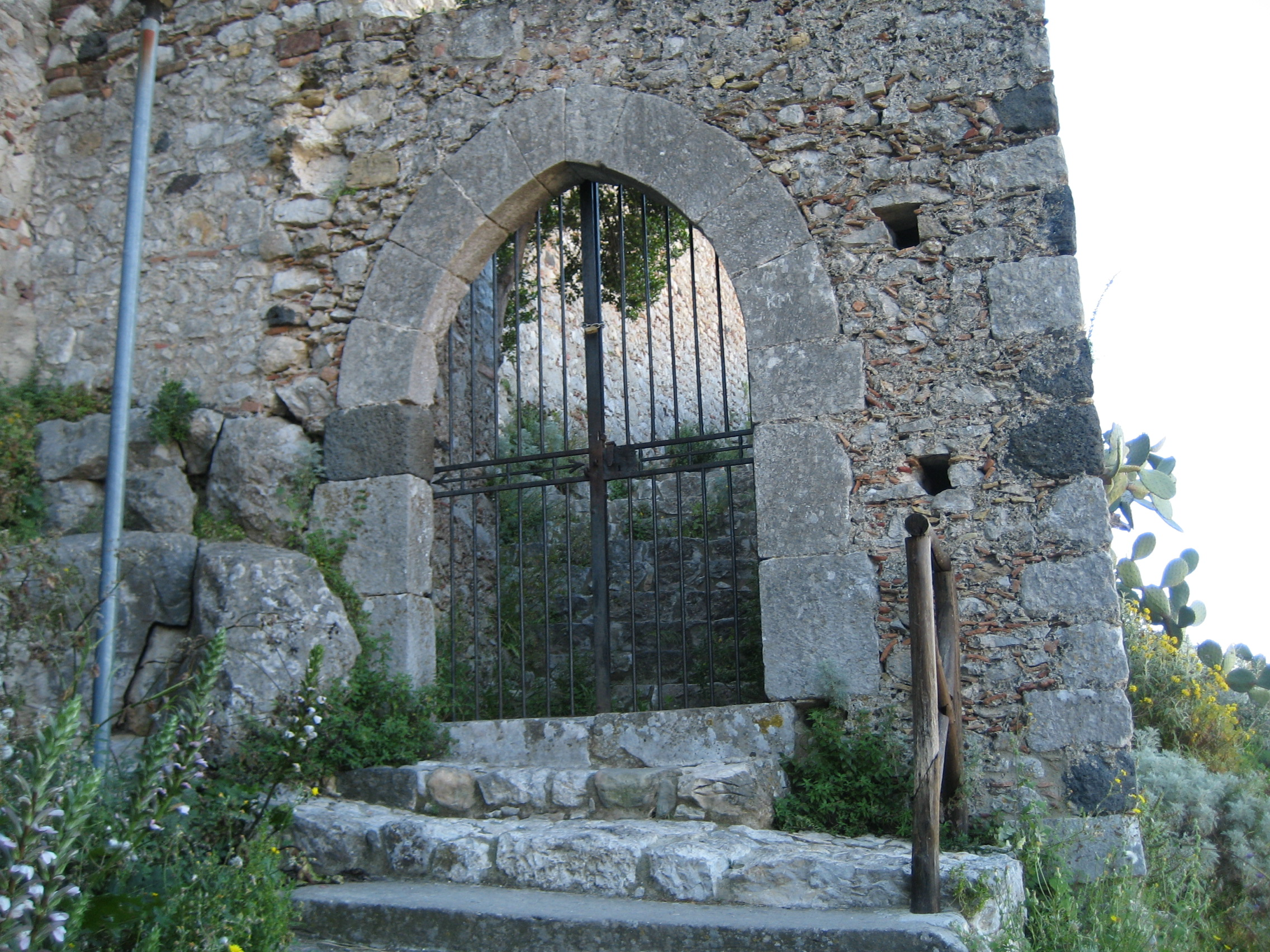 Portale gotico a Taormina (Castello Sarraceno)- Italy